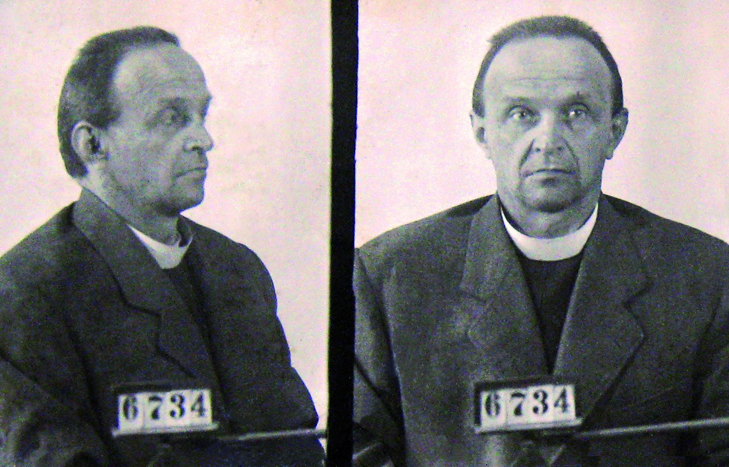 Adolf Kajpr - Vězeňská fotografie